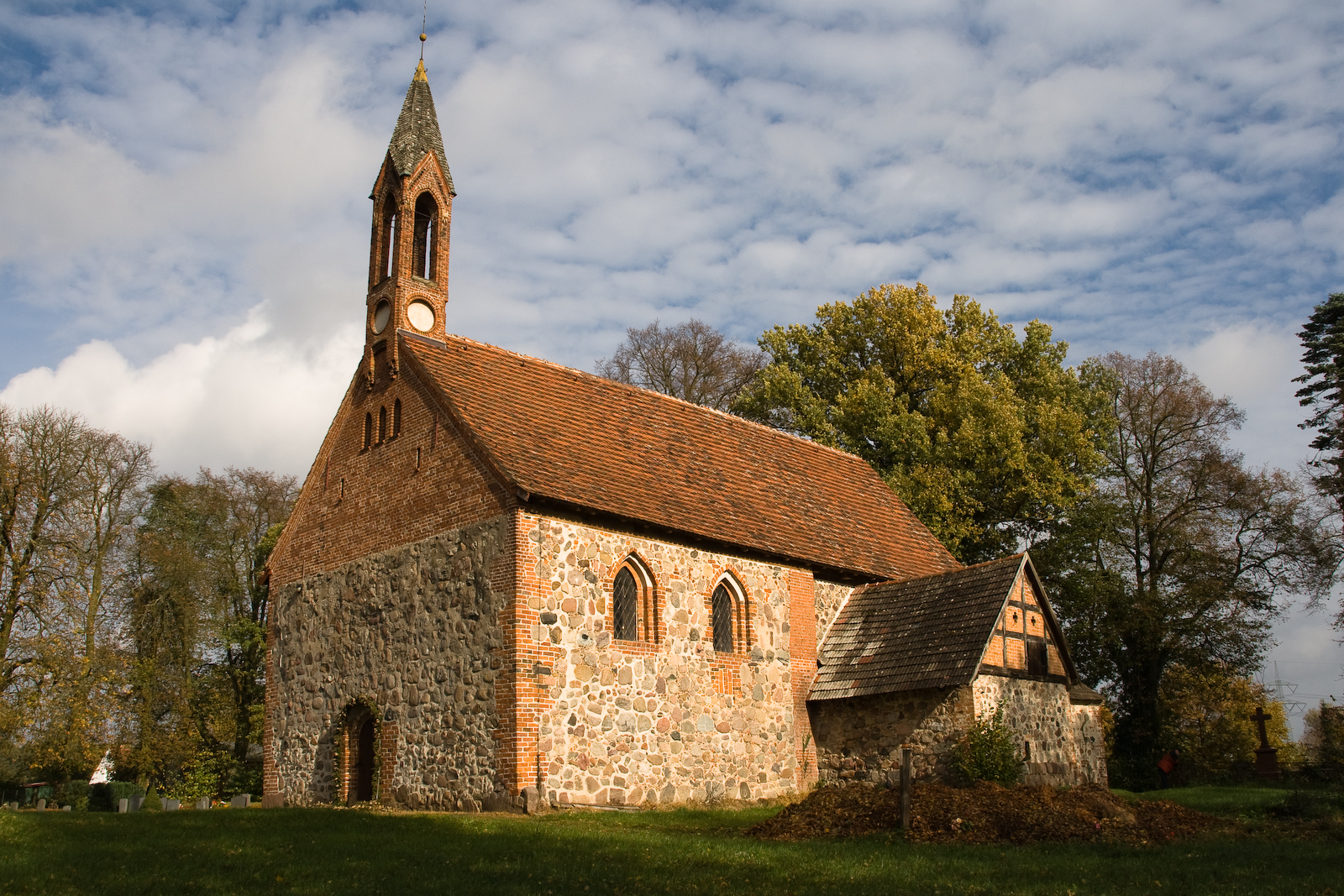 Foto der Kirche aus südlicher Richtung.